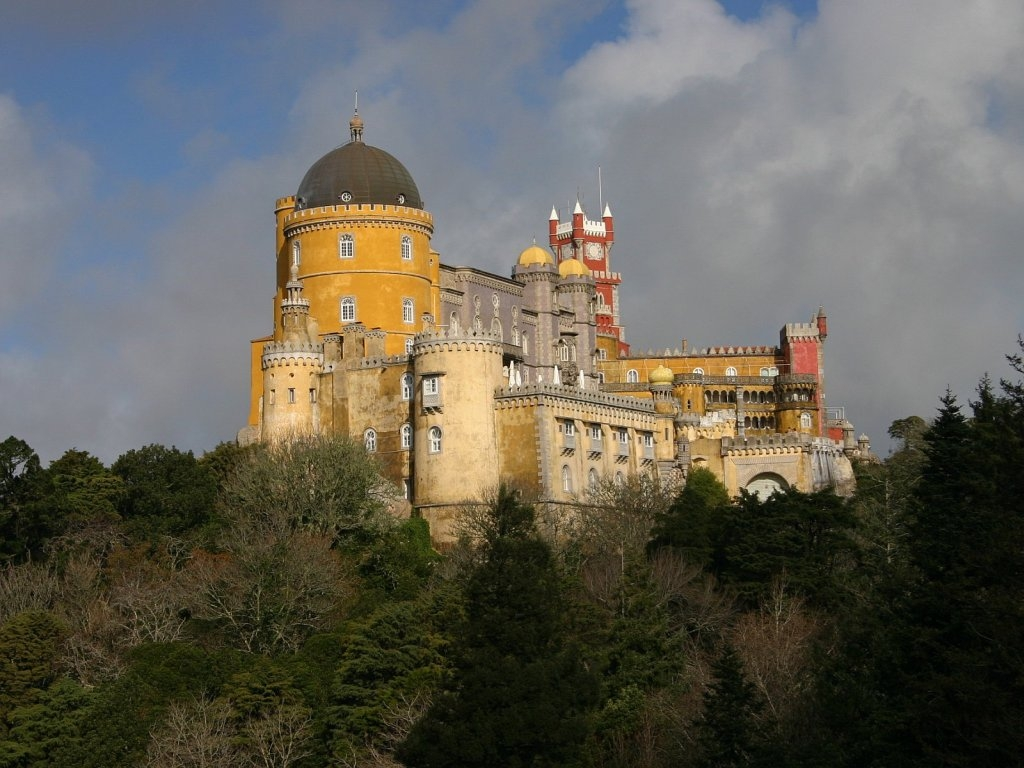 Palácio da Pena, Portugal